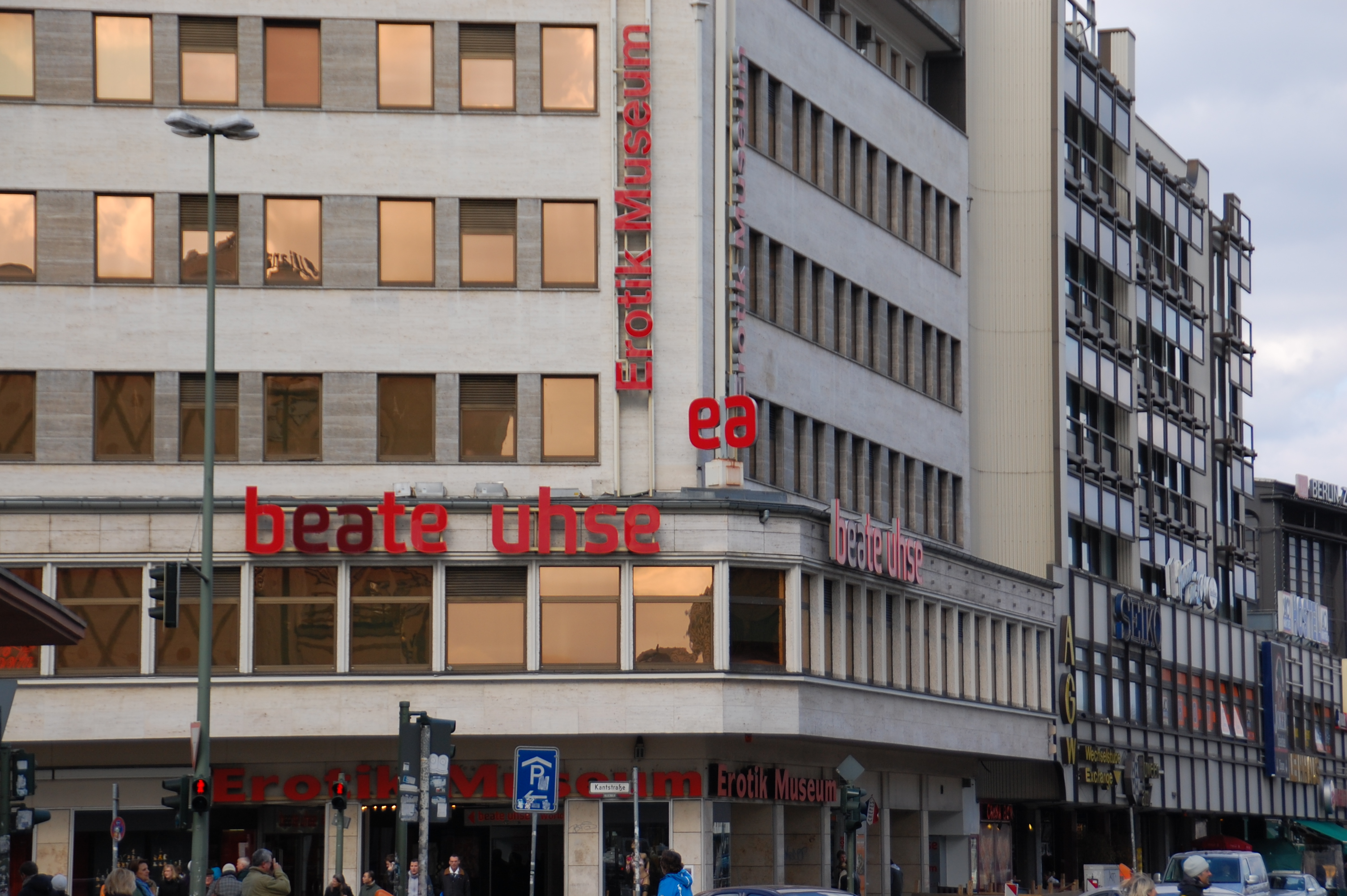 Beate Uhse Museum Berlin, Germany